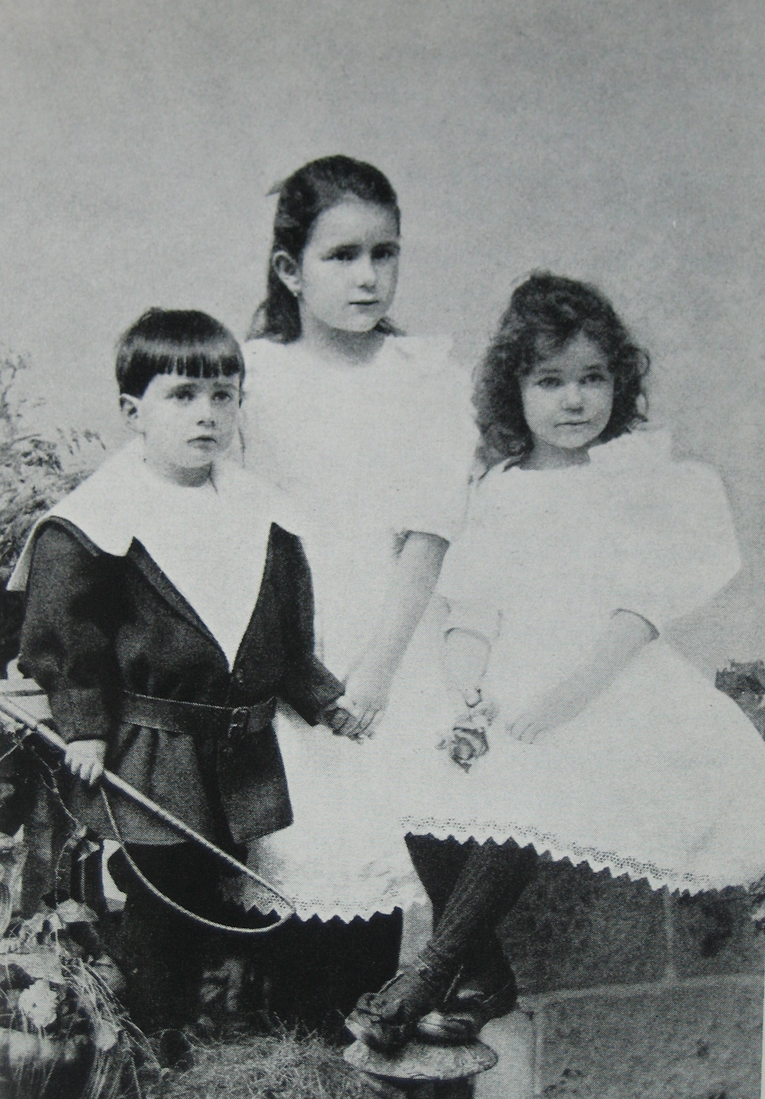 Olga Meyer mit ihren Geschwistern, um 1895.